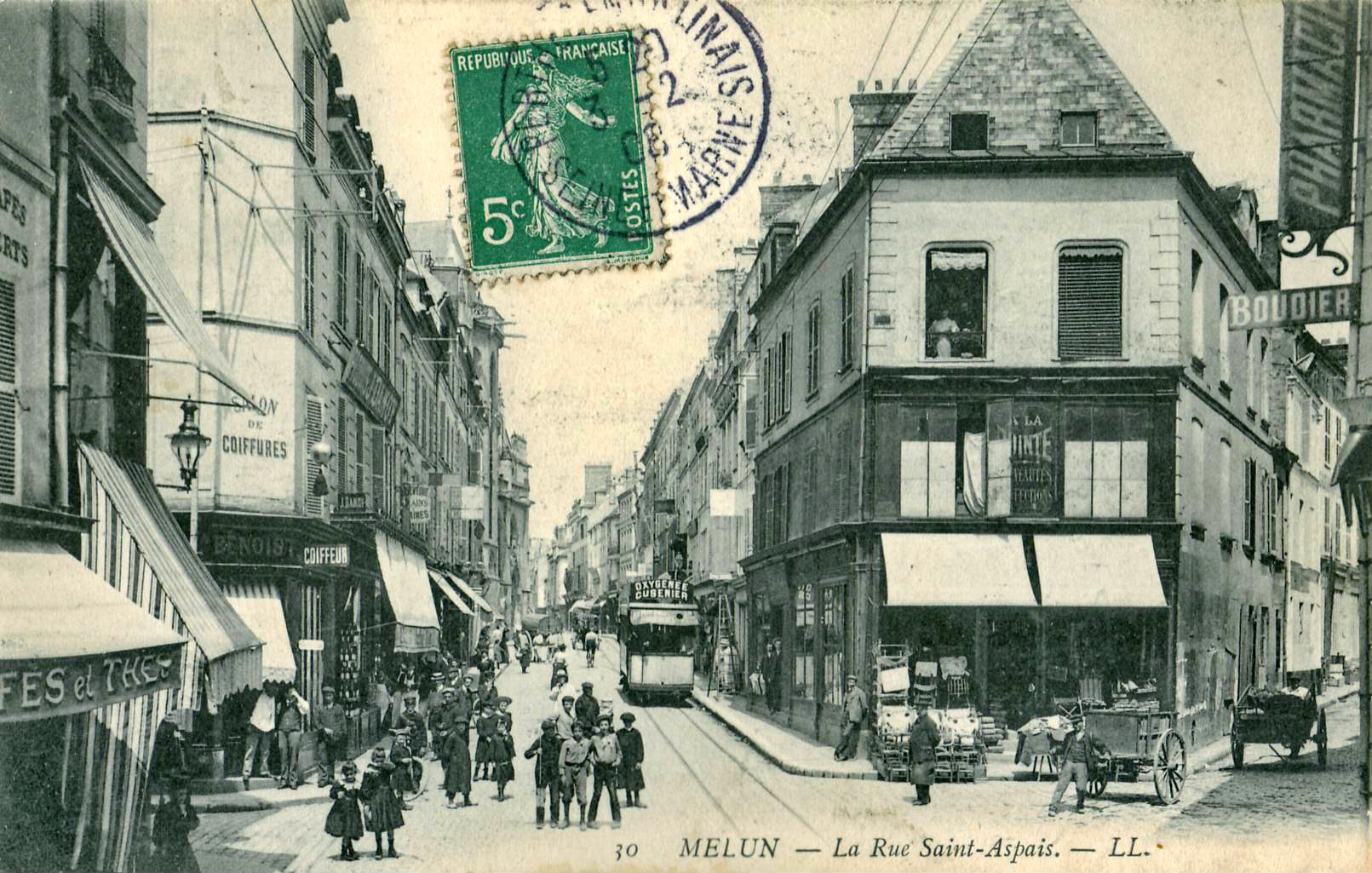 Carte postale ancienne éditée par LL, n°30 :MELUN - La rue Saint-Aspais